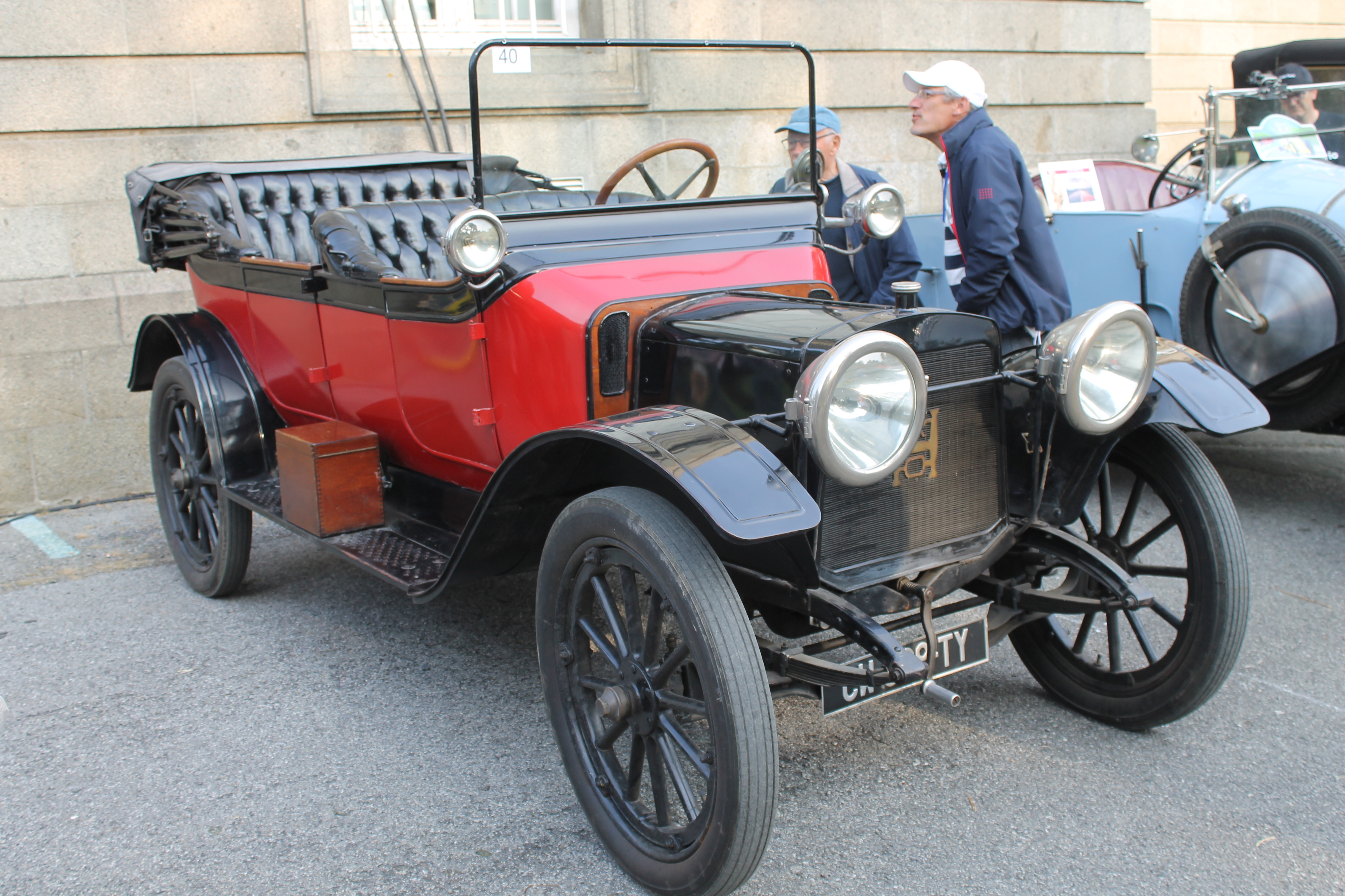 RCH 25 Convertible - Coupe Florio 2017